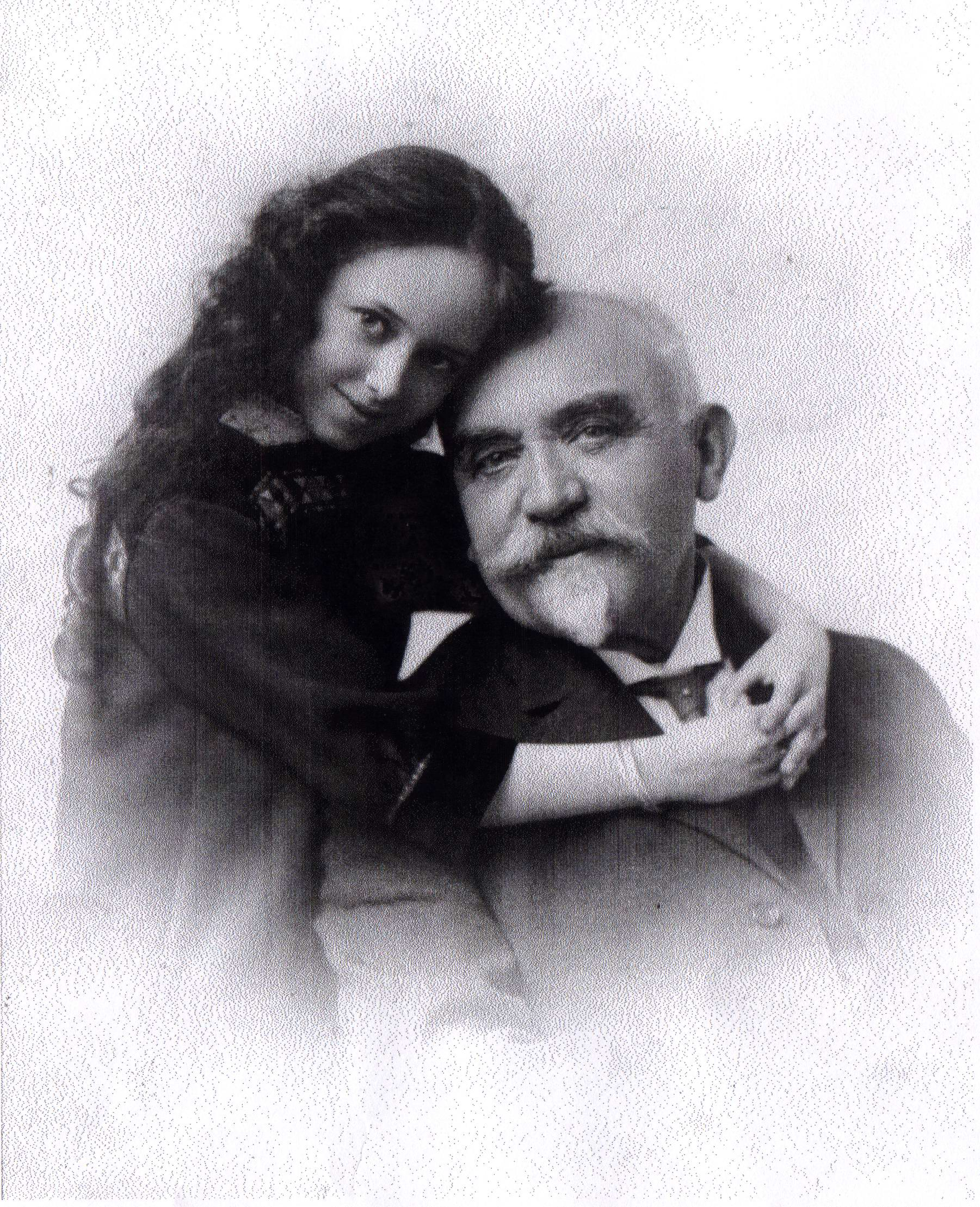 Otto Julius Klotz.